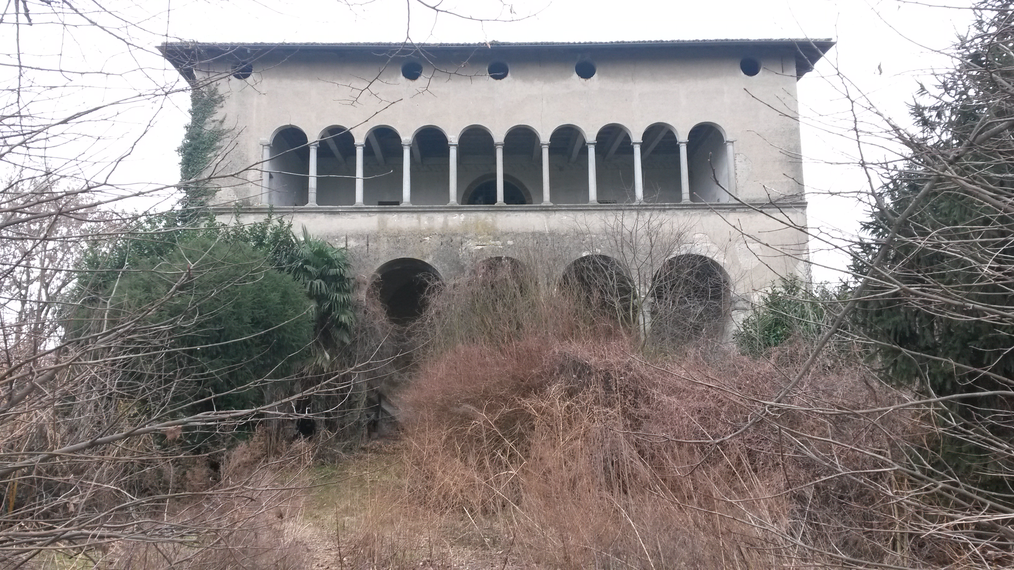 Castello di Buccinasco, nell'omonima frazione, all'interno del Parco agricolo sud di Milano. Fu ampliato e modificato da Ludovico il Moro nel 1463